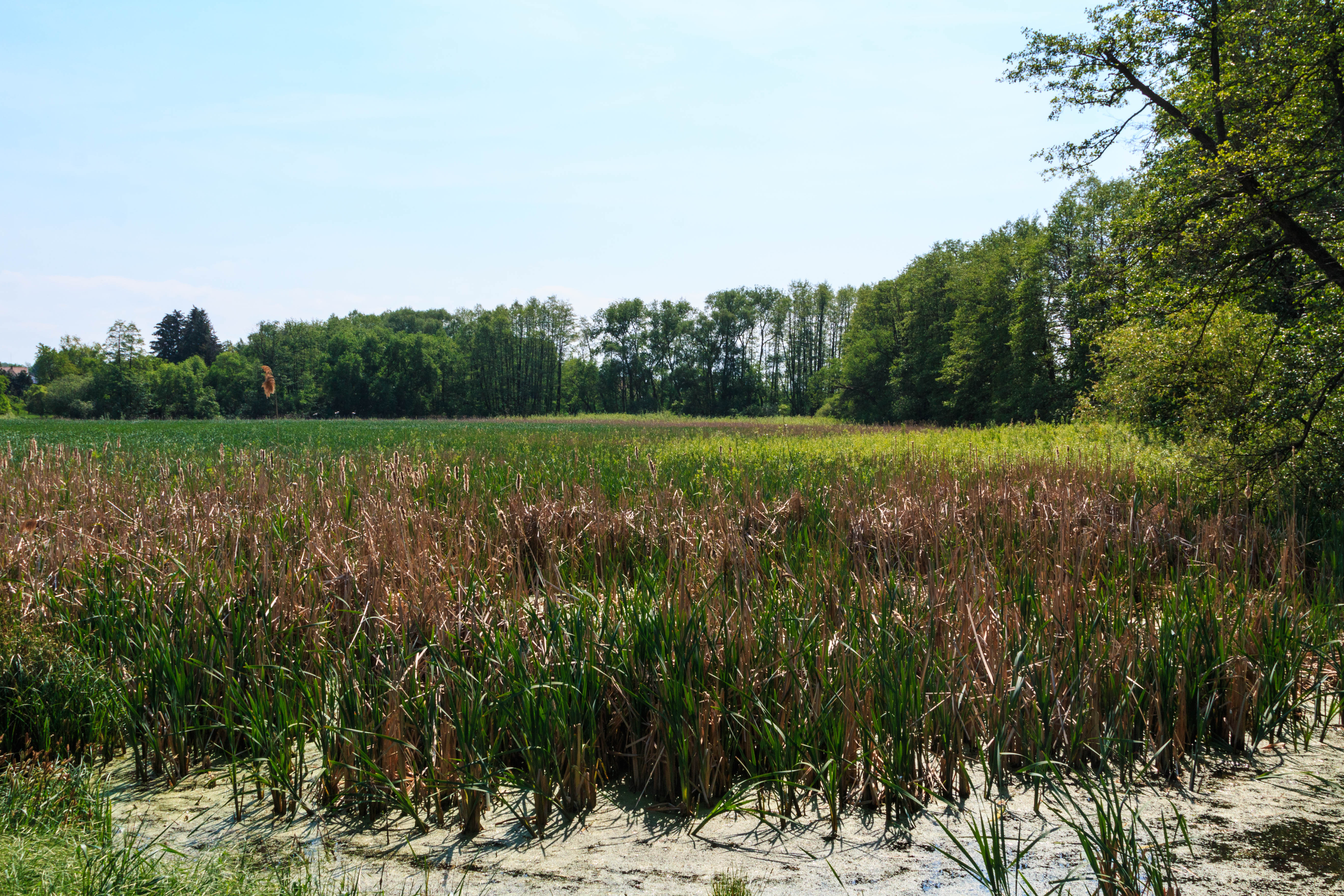 Slepotický rybník Project: Vodstvo.